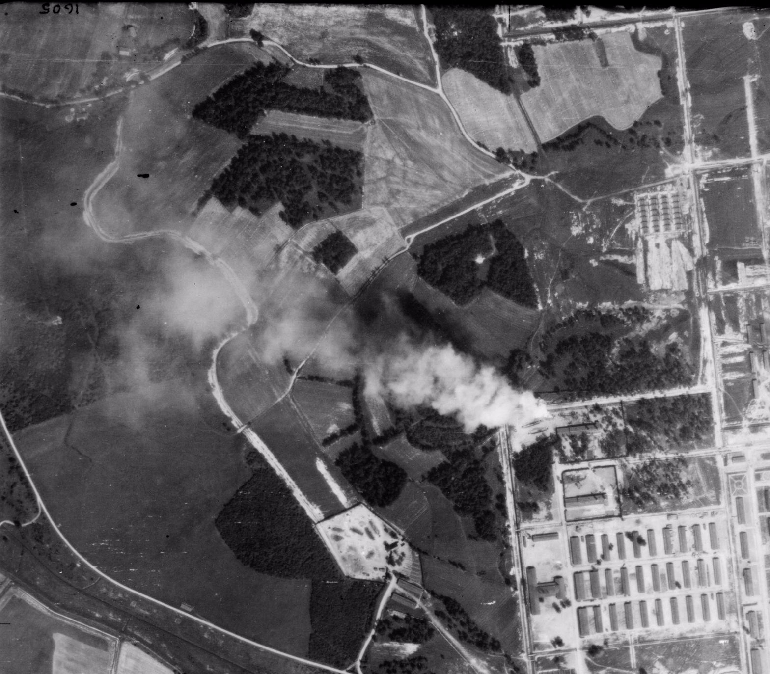 frame details Date: 23 August 1944 Date known Location: Plawy; Lesser Poland Province; Poland Coordinates (lat, lon): 50.038881, 19.165123 Description: Auschwitz Birkenau II concentration camp UNI: NCAP-000-000-029-092 Sortie: 60PR/0686 Frame: 3085 Corporate bodies 60 Squadron (SAAF) Image type: Vertical Scale: 9000